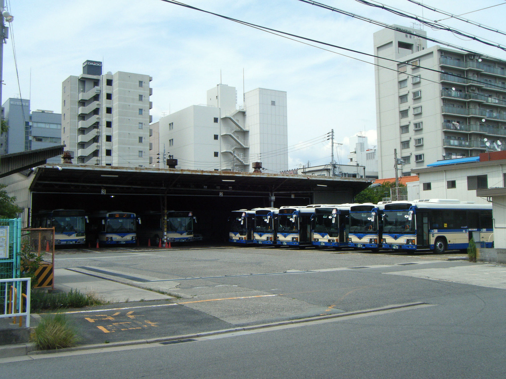 阪神バス 西宮車庫（旧西宮営業所） 兵庫県西宮市